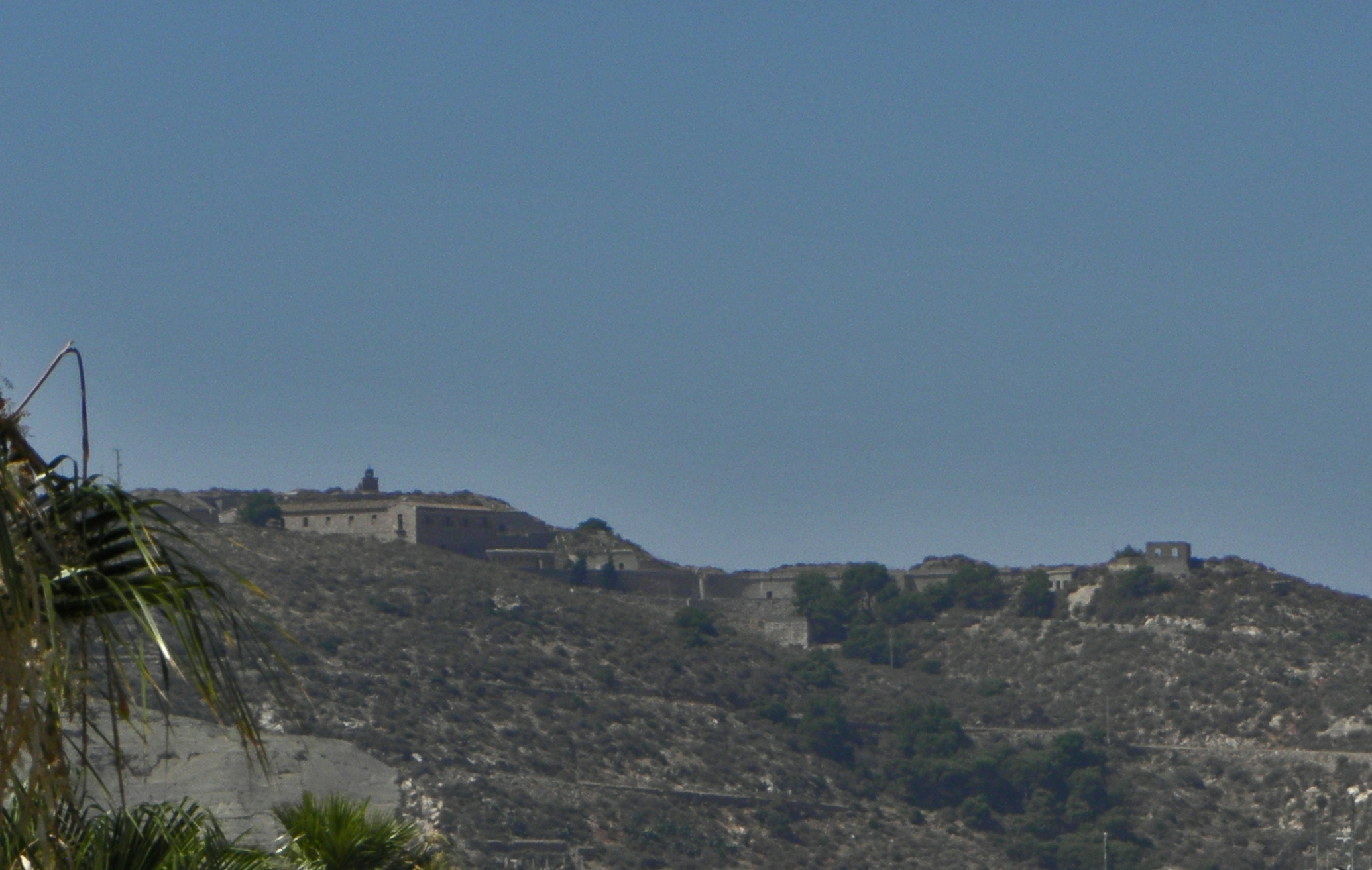 Esta foto participa en el juego En otro lugar de Flickr. Si no perteneces al grupo, no contestes, por favor. Si quieres contestar, únete